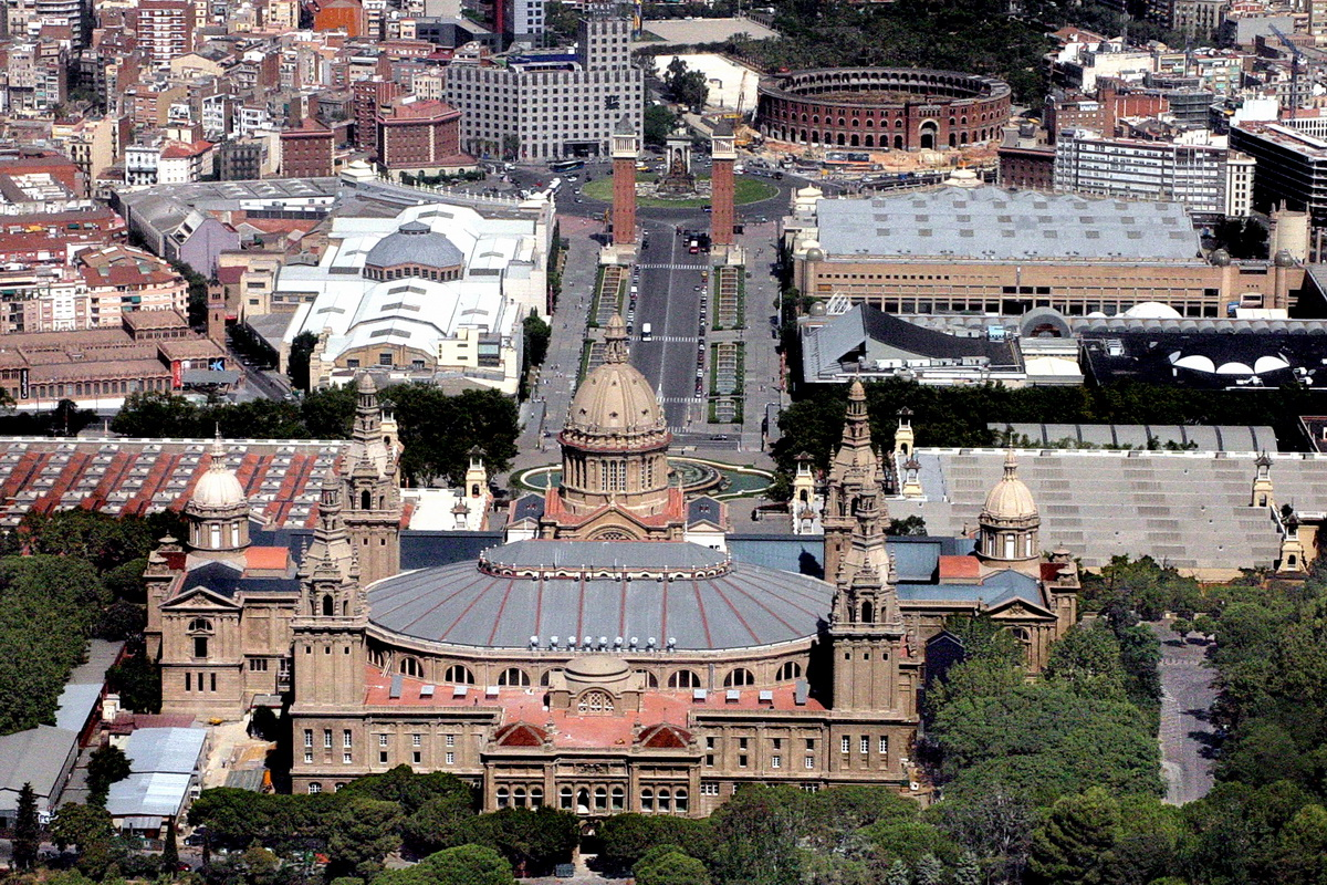 Vista posterior del Palau Nacional de Montjuïc a Barcelona amb els palaus d'exposicions de la Fira de Barcelona al darrera.